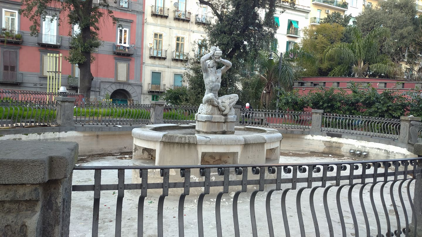 Fontana del Tritone in Piazza Cavour, Napoli.